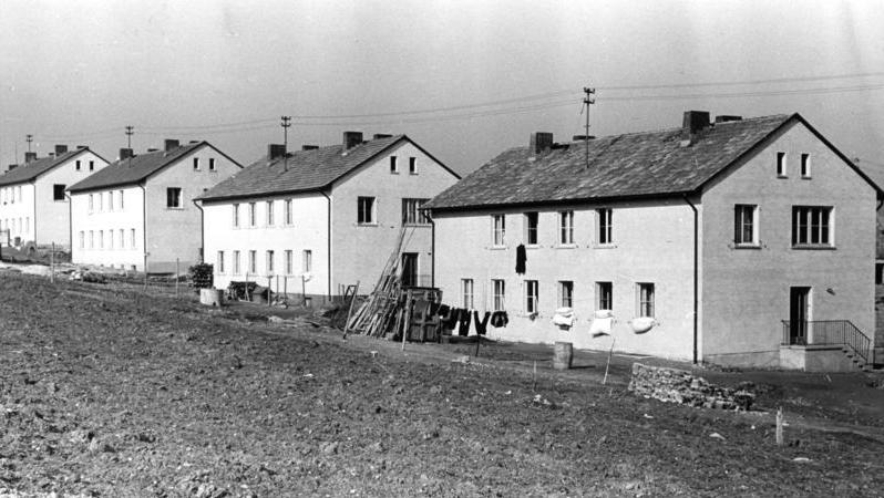 1952 Bleidenstadt/Taunus Heimatvertriebenen-Siedlung